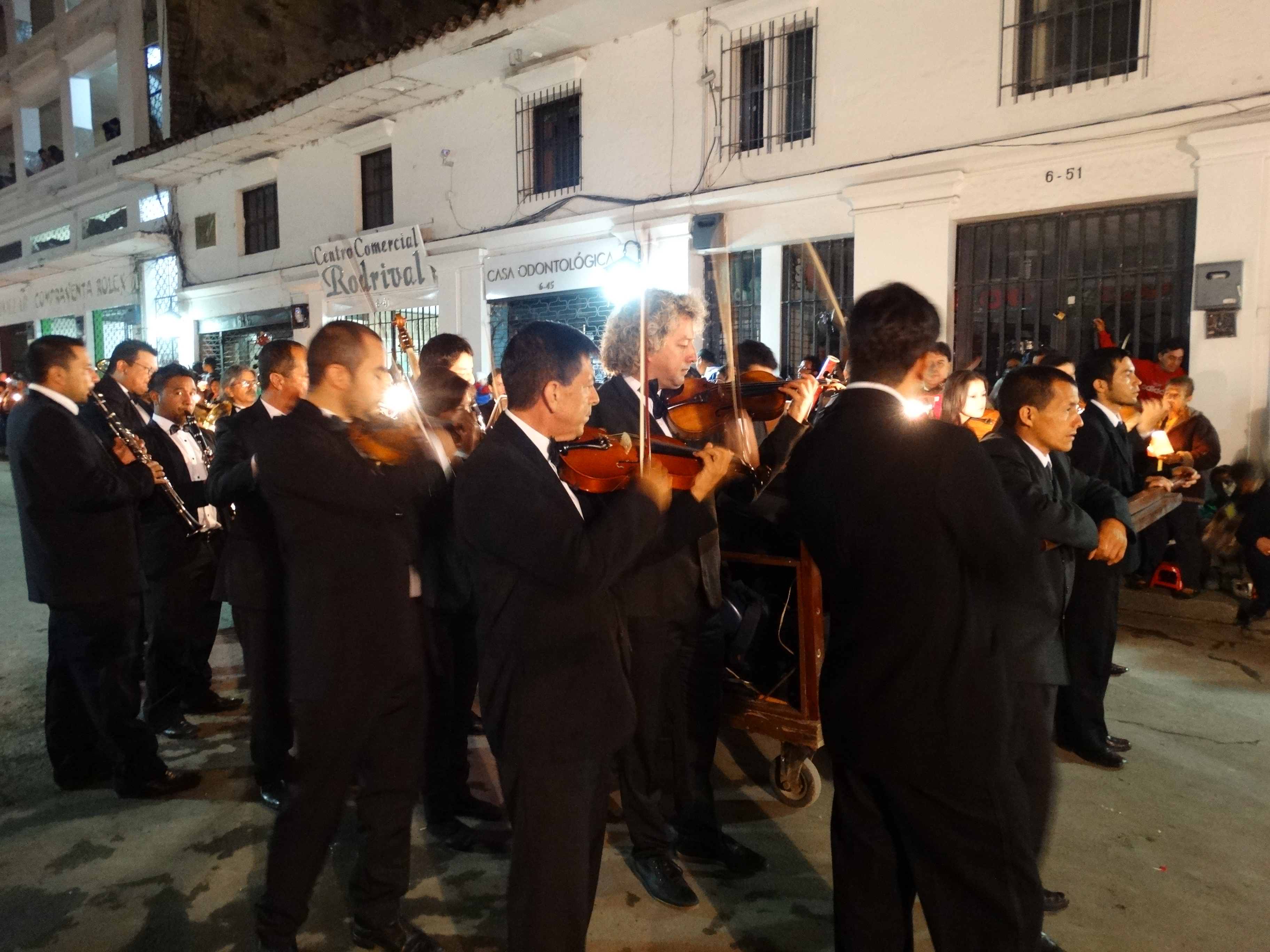 Semana Santa en Popayán